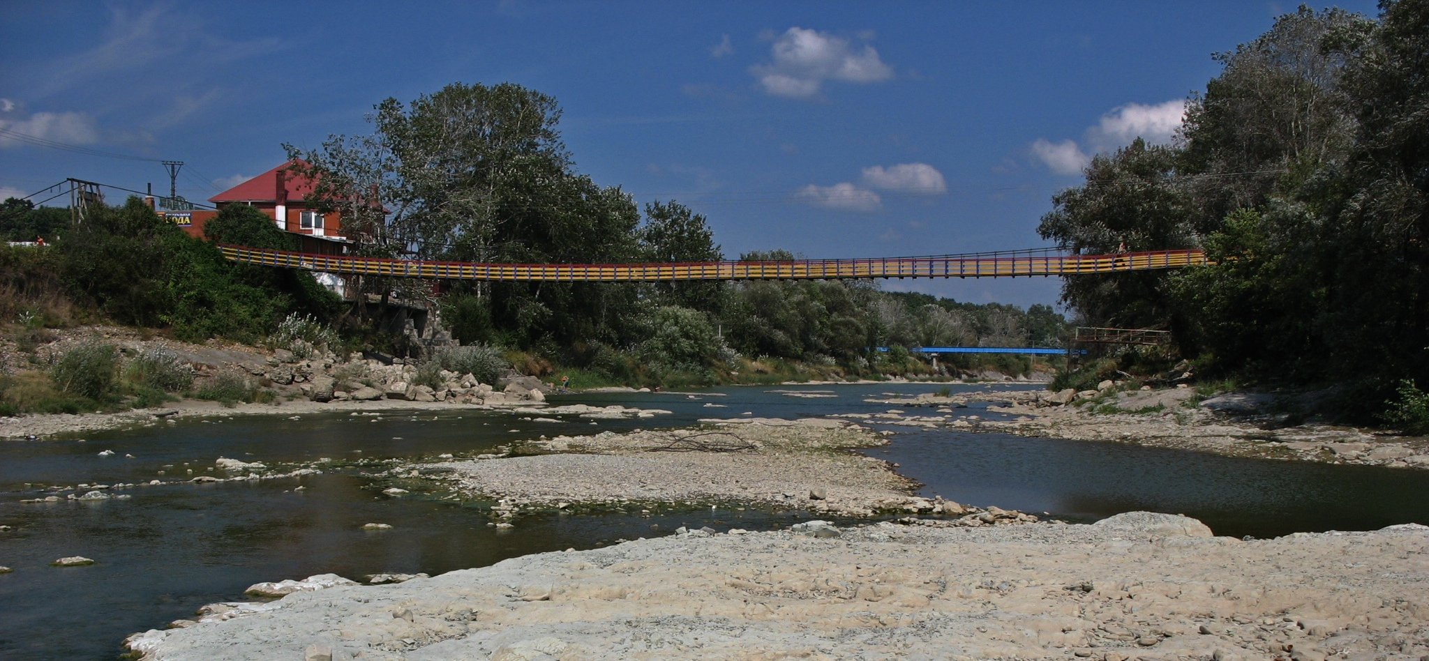 Висячий мост через реку Псекупс в Горячем Ключе, около мебельной фабрики